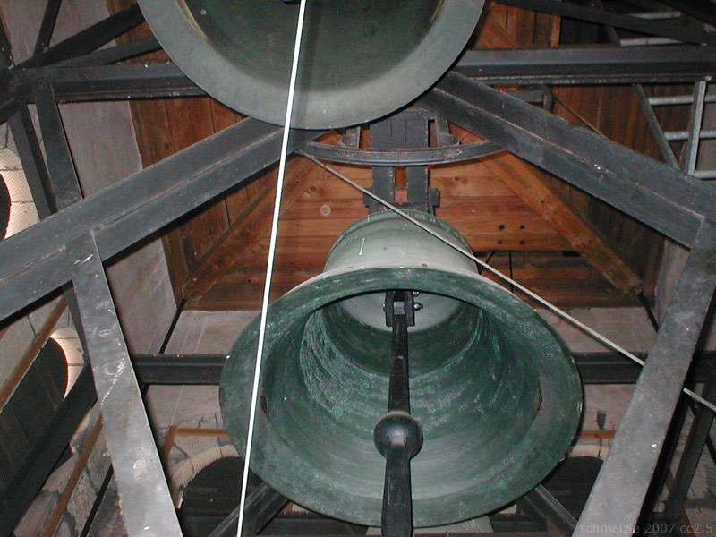 Blick in den Glockenstuhl der evang. Matthäuskirche in Heilbronn-Sontheim, Baden-Württemberg, Deutschland